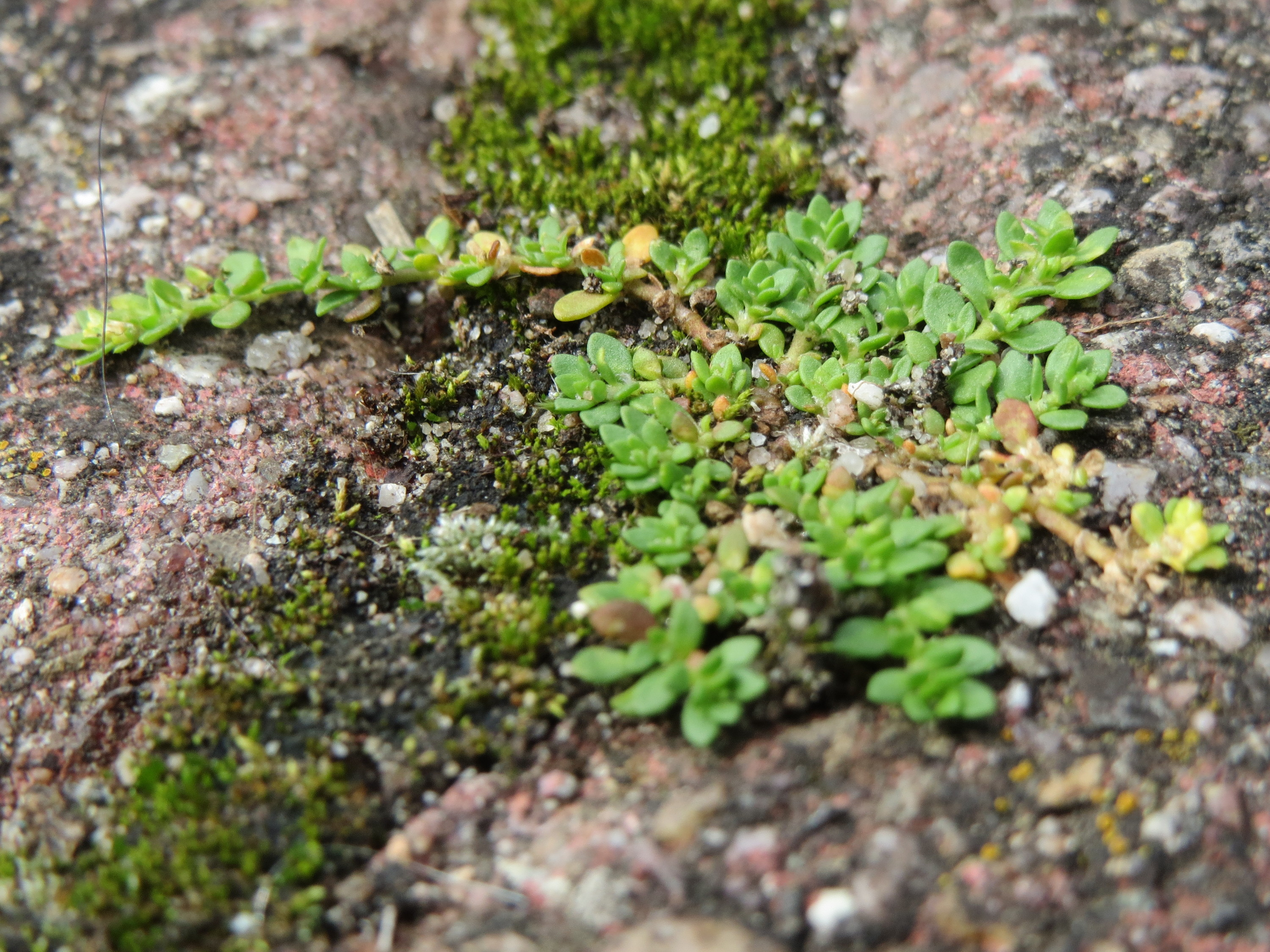 Kahles Bruchkraut (Herniaria glabra) in Hockenheim